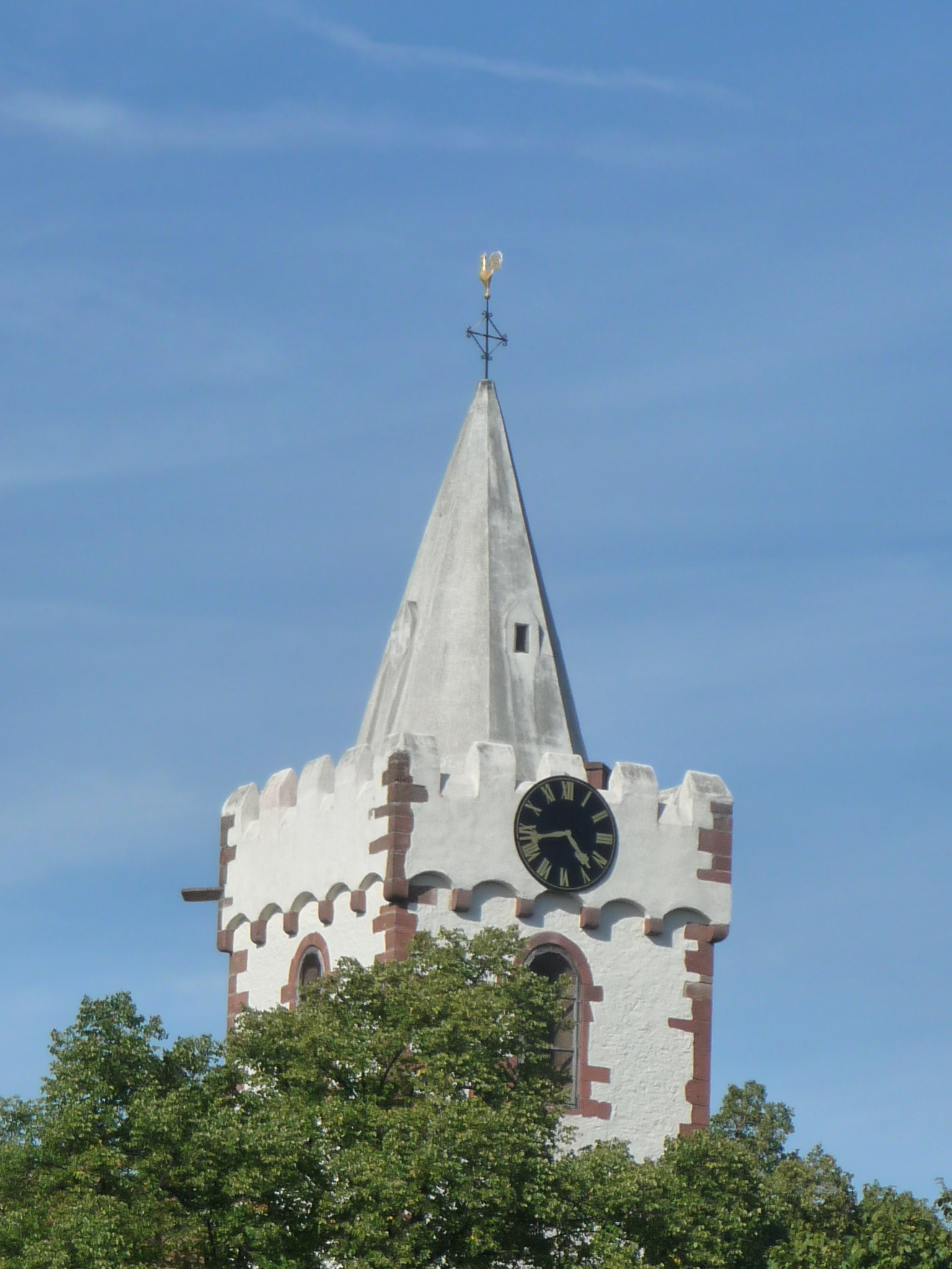 Bockenheim an der Weinstraße, Martinskirche, Schloßstraße 10. Signifikant ist der freistehende Kirchturm der ehemaligen Marienkirche aus dem 13. Jahrhundert, der 1518 instand gesetzt wurde. Um 1700 wurde die Innenausstattung barockisiert. Kreuzförmige Anlage, im Kern 11. Jahrhundert (?), spätgotischer Umbau Anfang des 16. Jahrhunderts, Glockenturm im Kern Mitte des 12. Jahrhunderts, Obergeschosse gotisch, nach 1460, Glockengeschoss wohl nach 1688, Zinnenkranz wohl 1806; umfriedeter Kirchhof: Kriegerdenkmal, Ovalzylinder, um 1930; barocke Grabmäler